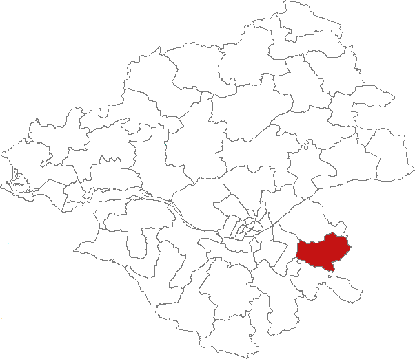 Carte de localisation du canton de Vallet (France, Loire-Atlantique)